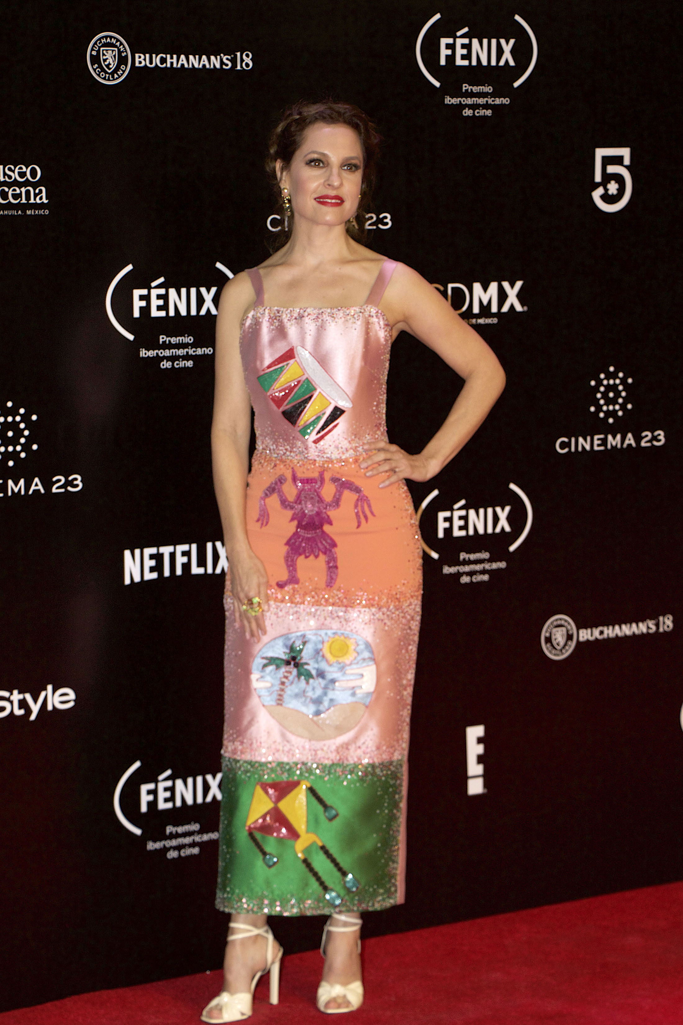 Miércoles 7 de noviembre de 2018. Previo a la entrega de los Premios Fénix 2018, actores, actrices, elencos de las películas y series nominadas, pasaron por la alfombra roja, en la parte exterior del Teatro de la Ciudad Esperanza Iris. Fotografía: Milton Martínez / Secretaría de Cultura CDMX.